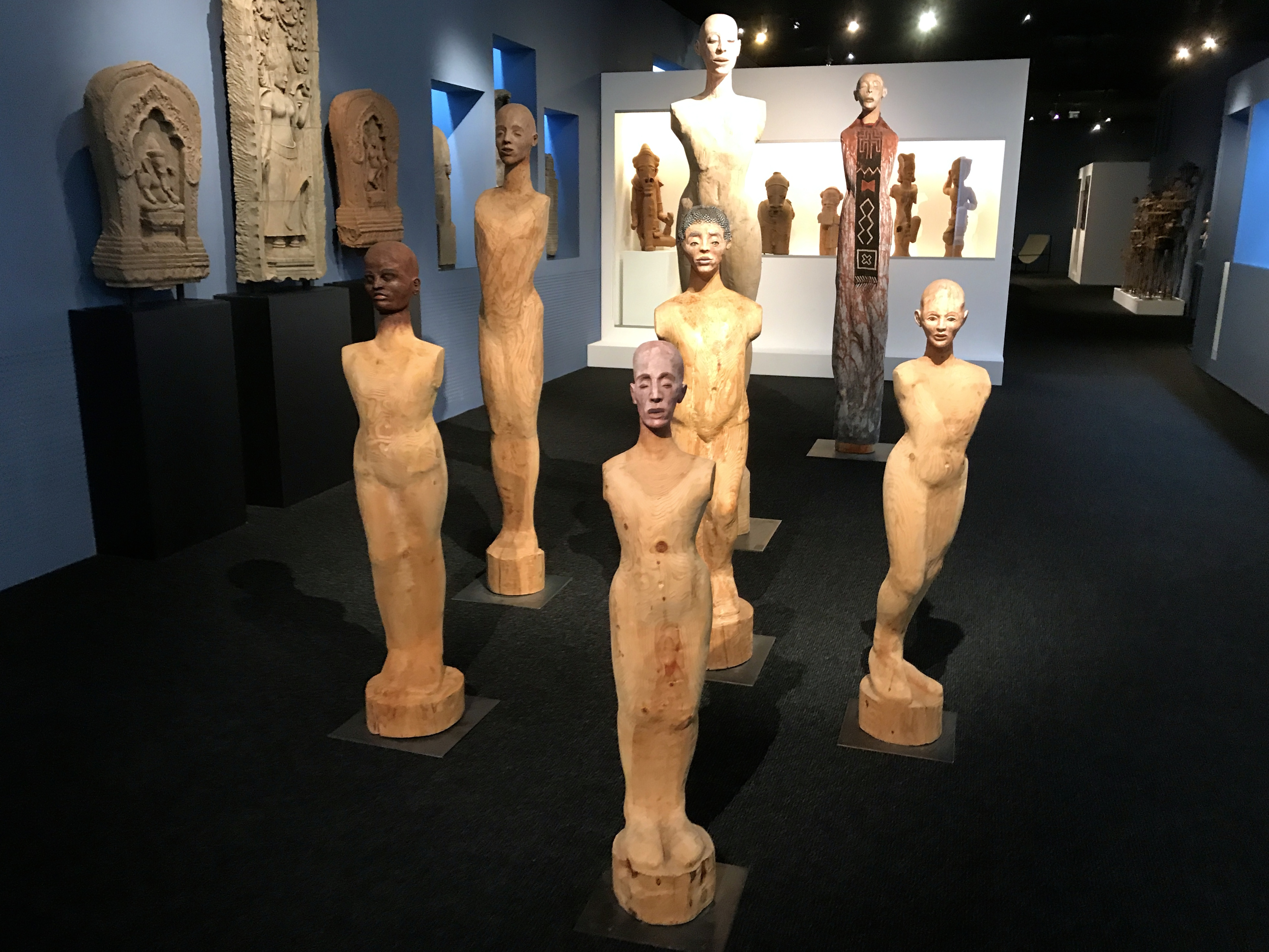 Leon Pollux "Menschen" - 1.OG